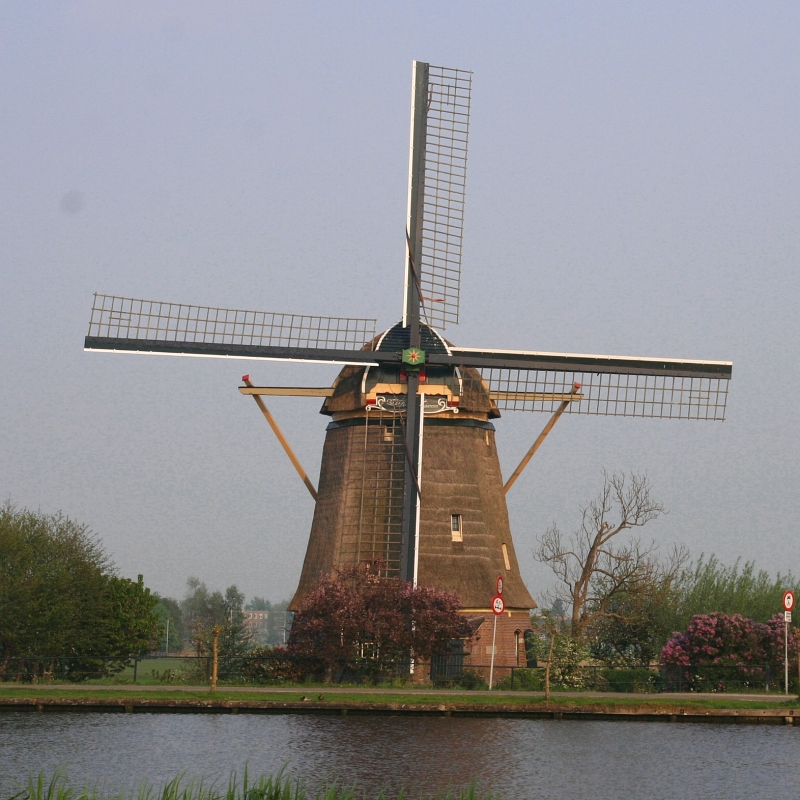 De Zwaan Molen in Oudekerk a/d Amstel